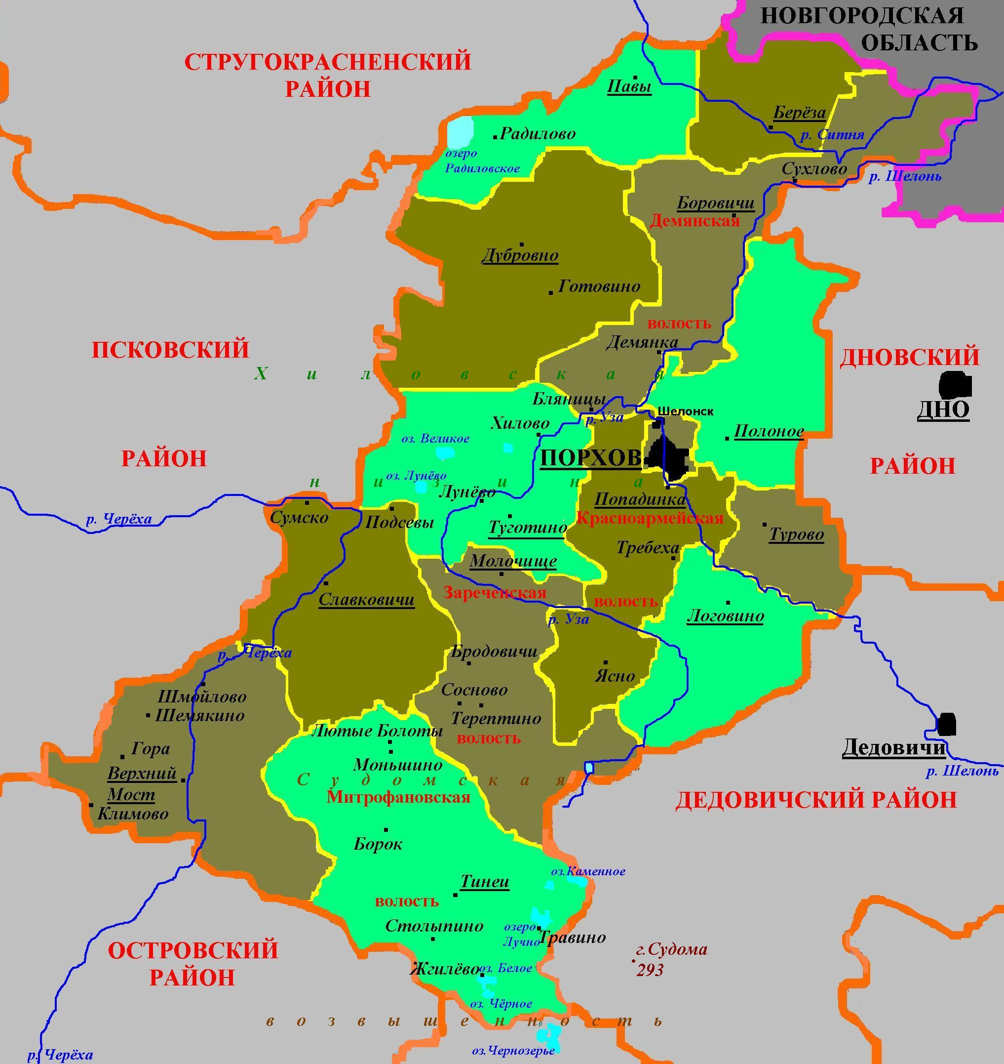 Административное деление Порховского района